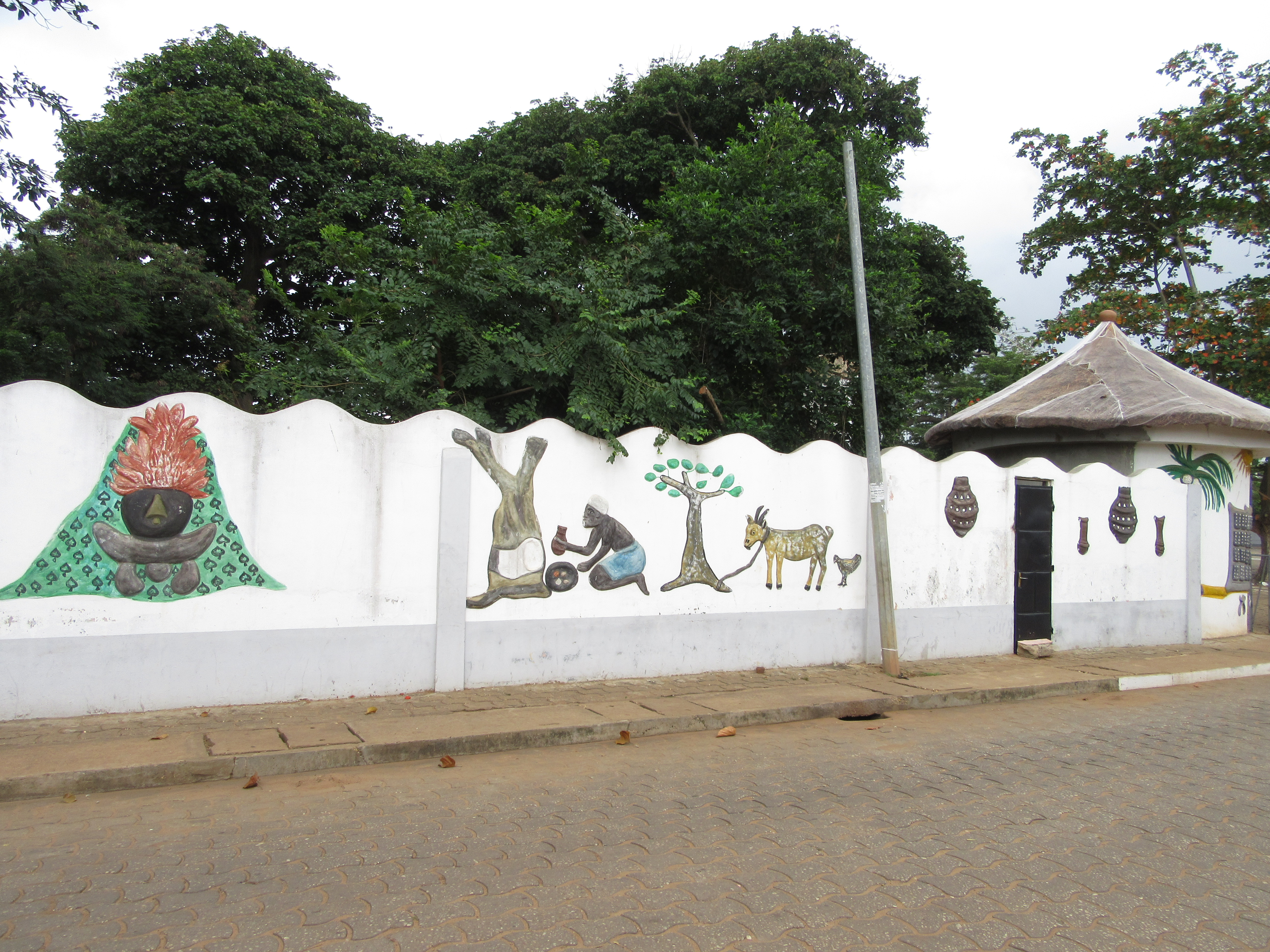 Temple des Pythons Le temple de Dangbé est consacré au culte du python dont des dizaines de spécimens se prélassent dans l'une des petites cases. Si vous voulez avoir un python autour du cou, le guide se fera un plaisir de vous le passer, moyennant un petit billet. Sinon il vous parlera du python, dieu vaudou vénéré jusqu'à Grand-Popo, où sa représentation orne de nombreux temples. A Ouidah, les familles xweda et fon qui pratiquent le culte du python Dangbè (dit aussi Dan) se distinguent par des scarifications symbolisant les marques frontales du python. Wikidata has entry Q36698317 with data related to this item.